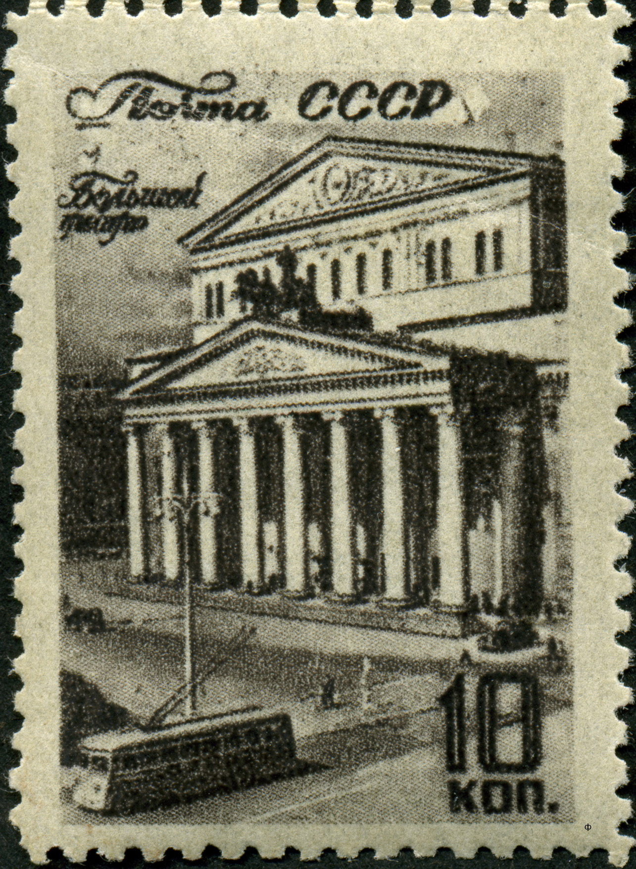 Марка СССР